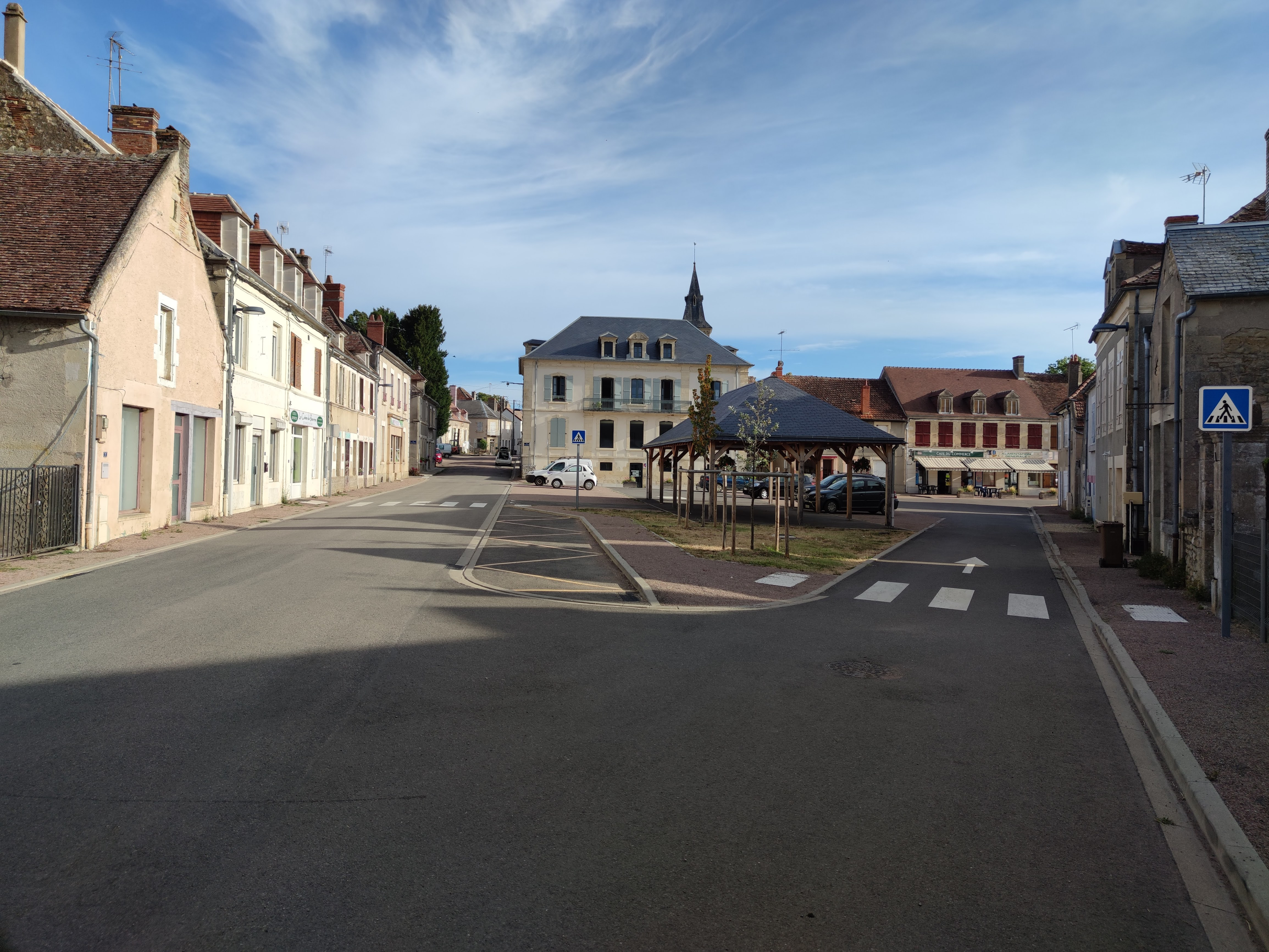 Place de Brinon-sur-Beuvron (58).